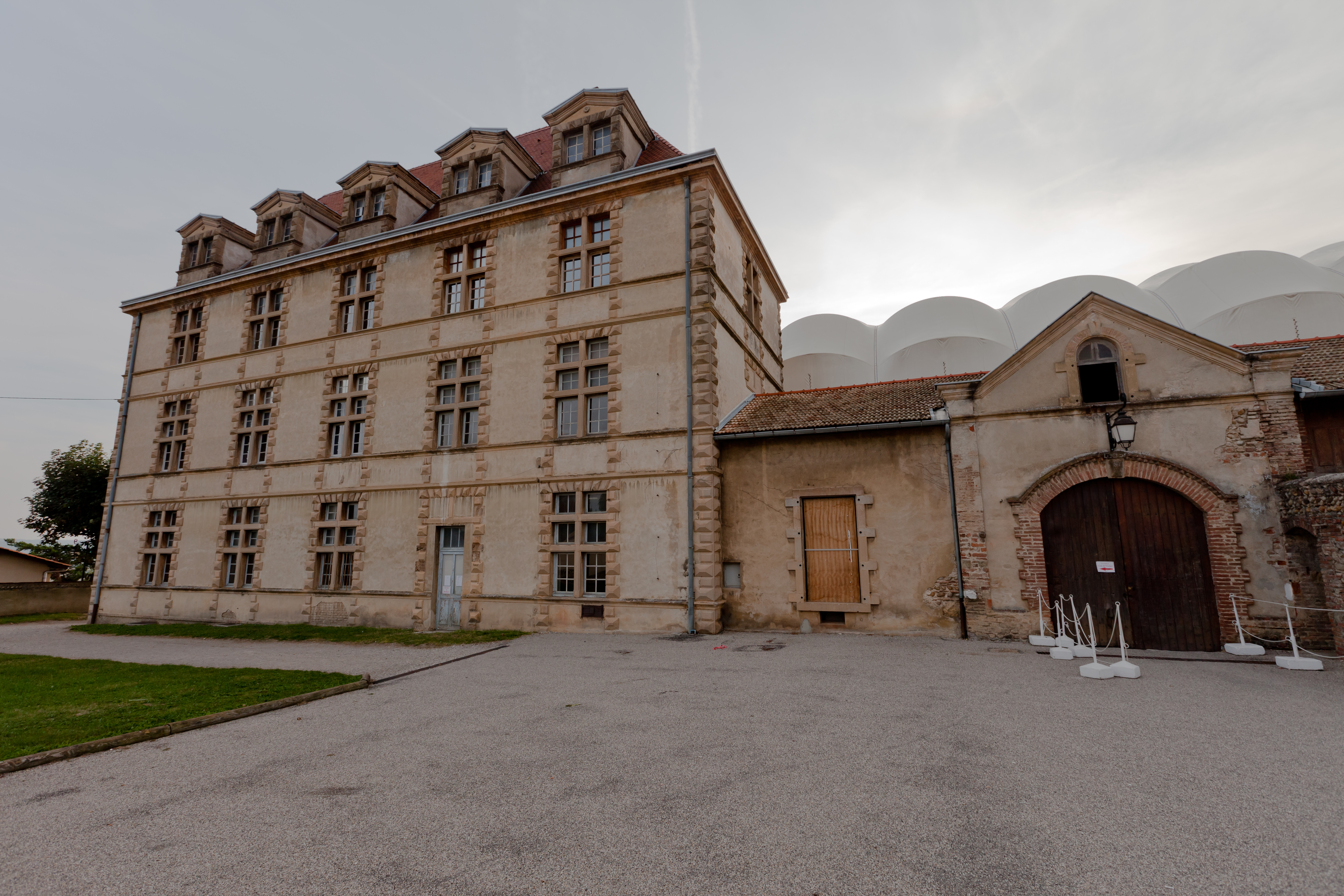 Château de La Côte-Saint-André, (Classé, 1983) .